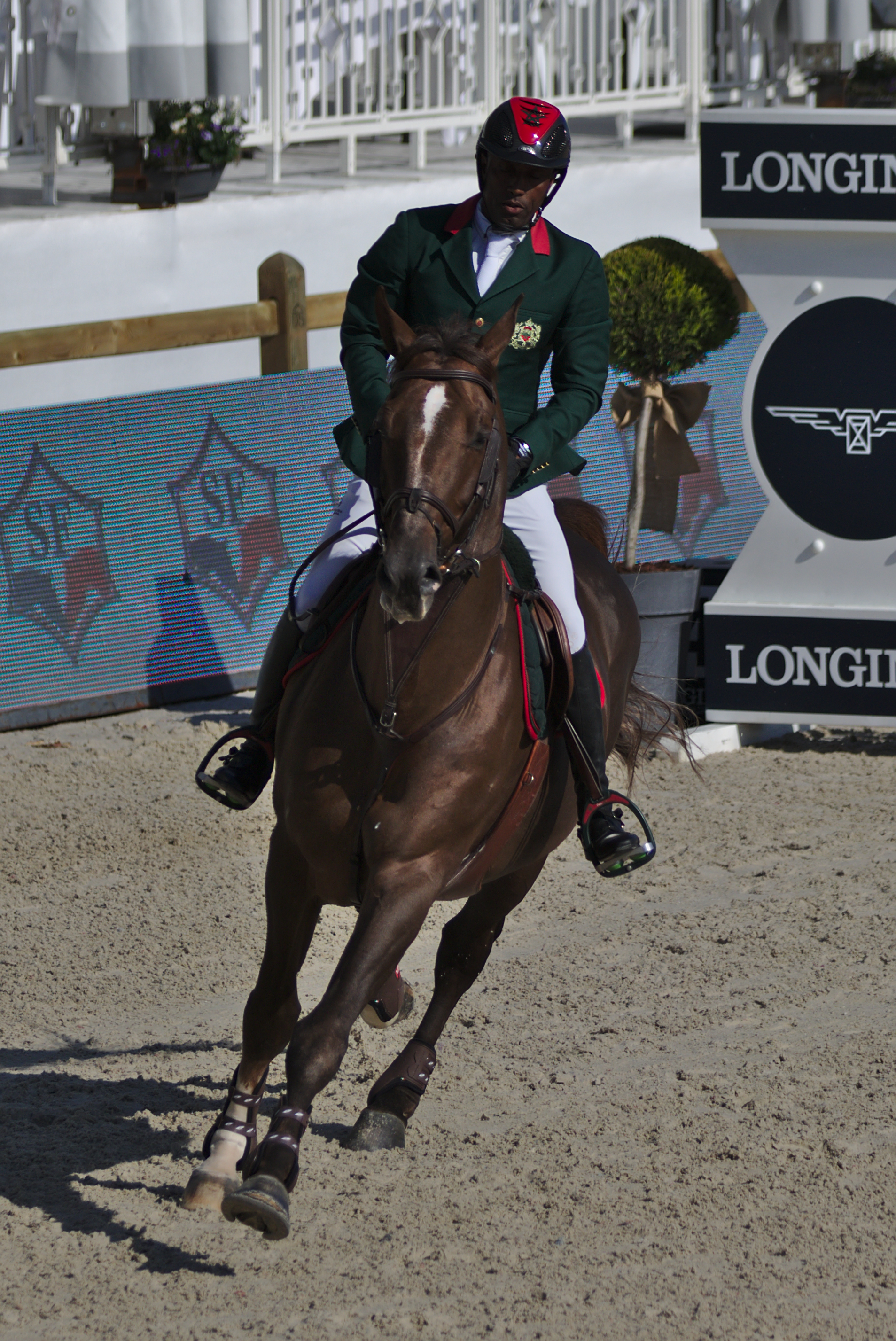 ILHS 2016 - 20160909 - Abdelkebir Ouaddar et Saphir du Talus